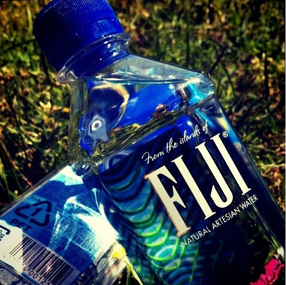 本人が撮影したものです。